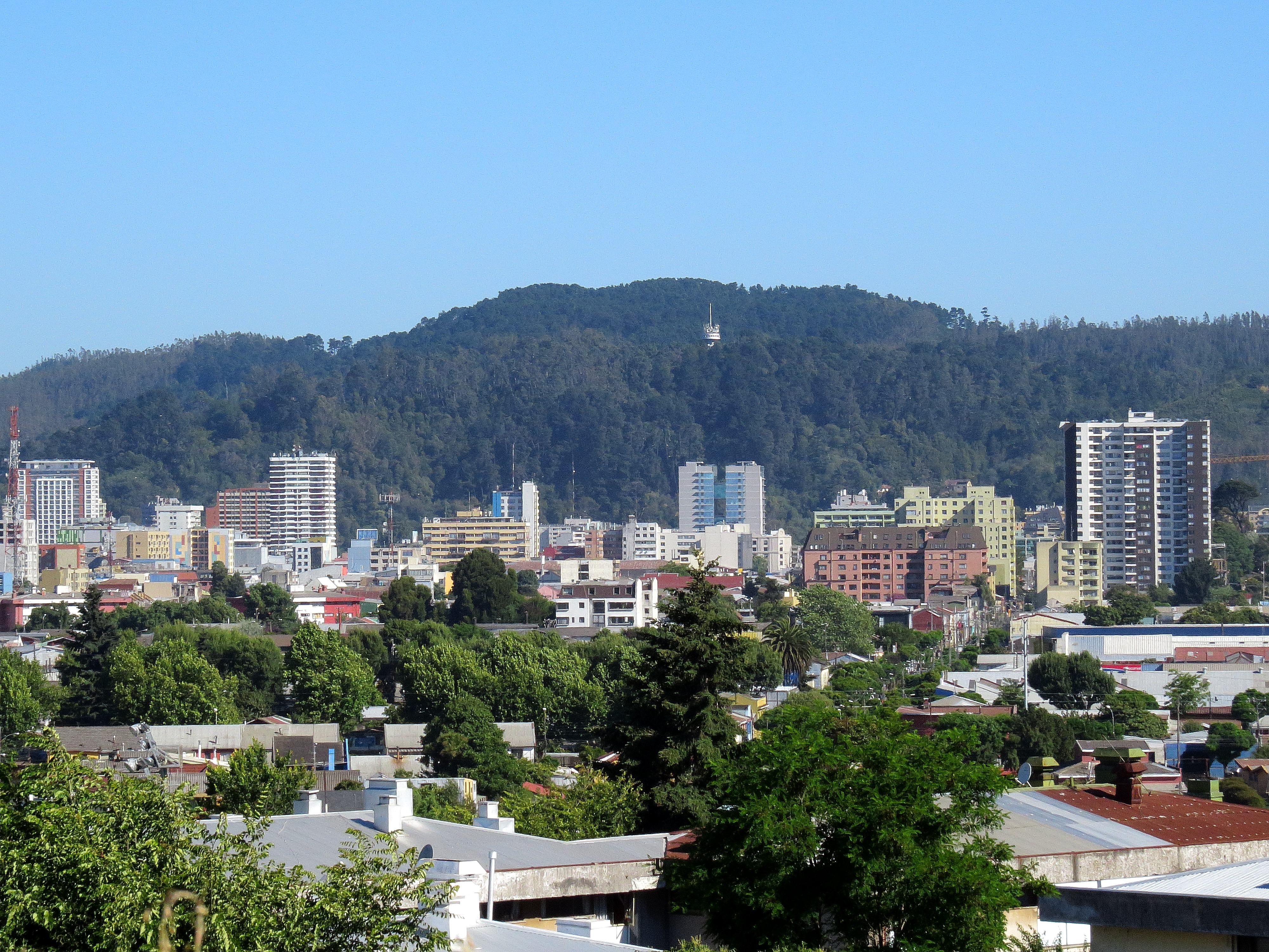 Vista del cerro Caracol que domina la ciudad de Conceción Chile